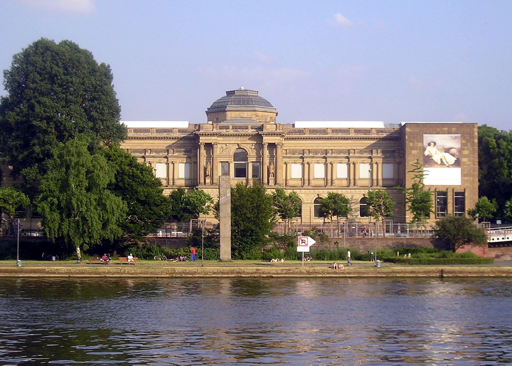 Städelsches Kunstinstitut ("Städel), Frankfurt am Main. Photography: F. Bucher